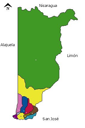 Mapa dos cantões de Heredia, Costa Rica